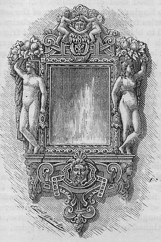 Elizabethan mirror.